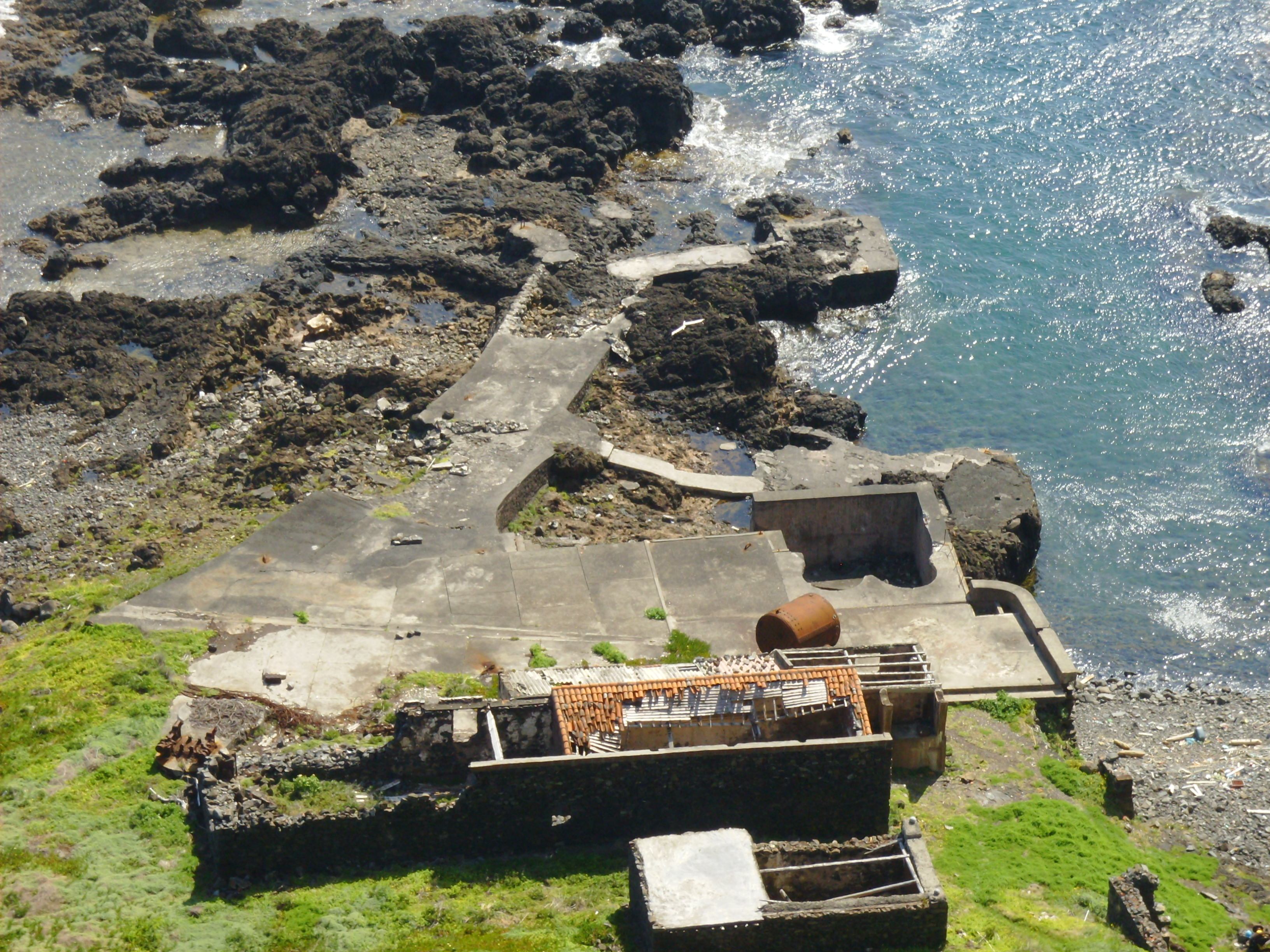 Fábrica da Baleia, ponta do Castelo, Ilha de Santa Maria (Açores), Portugal